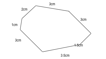 Voorbeeld van omtrek